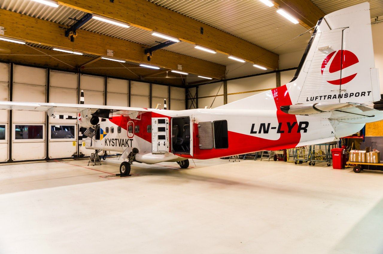 Dornier DO 228-202K